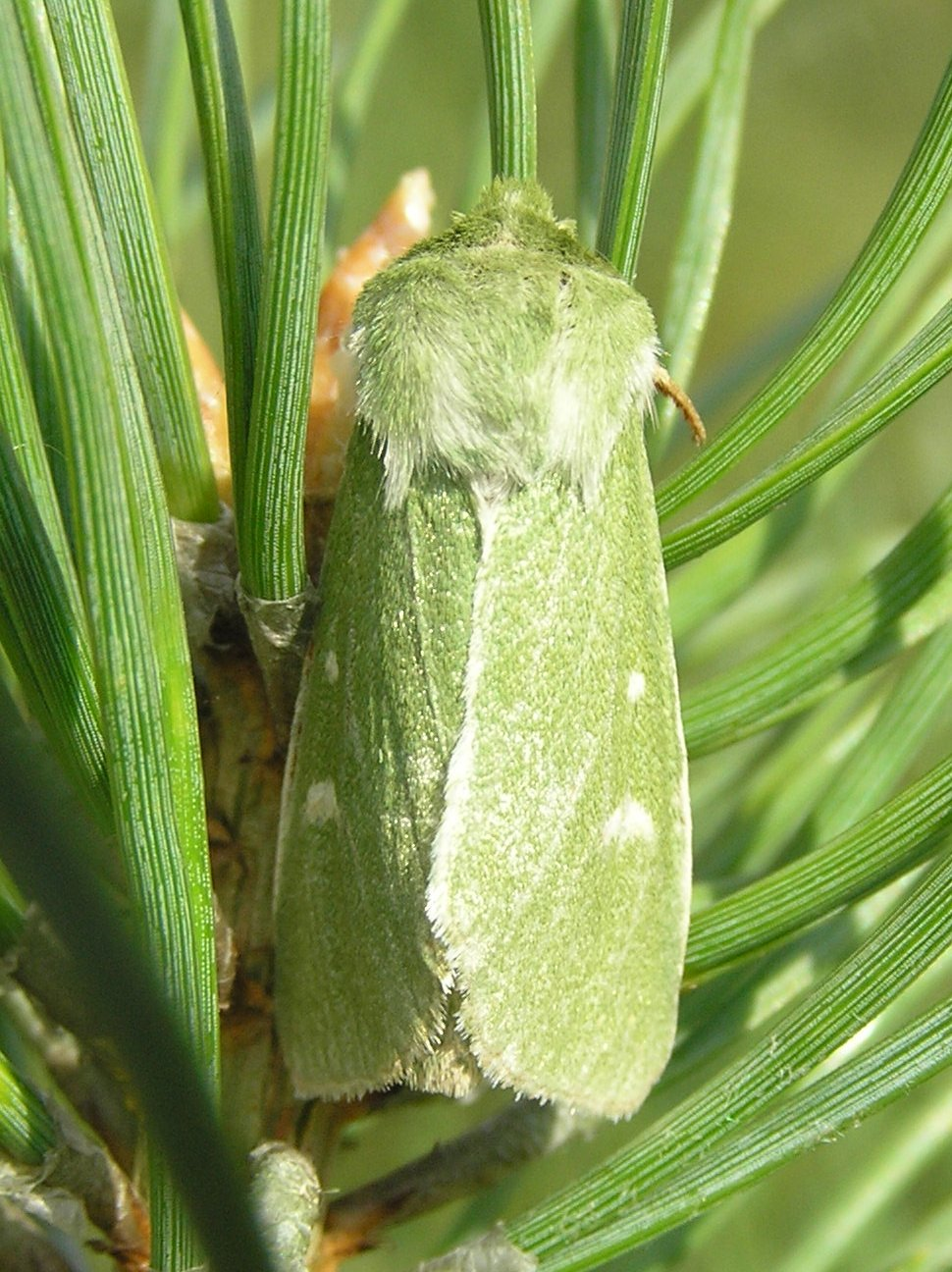 Calamia tridens